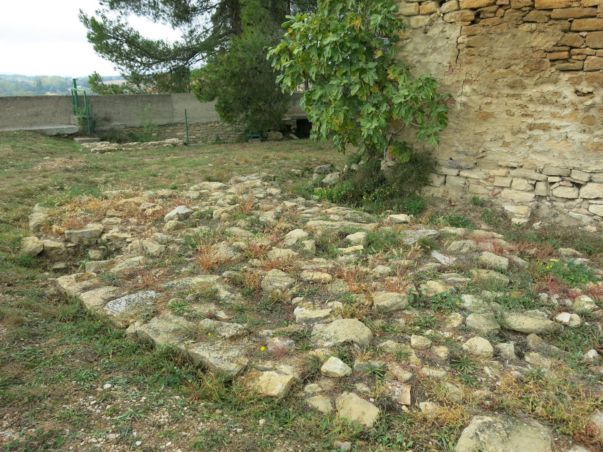 fonaments de la Gran Torre del castell d' Àger - Noguera / Catalunya